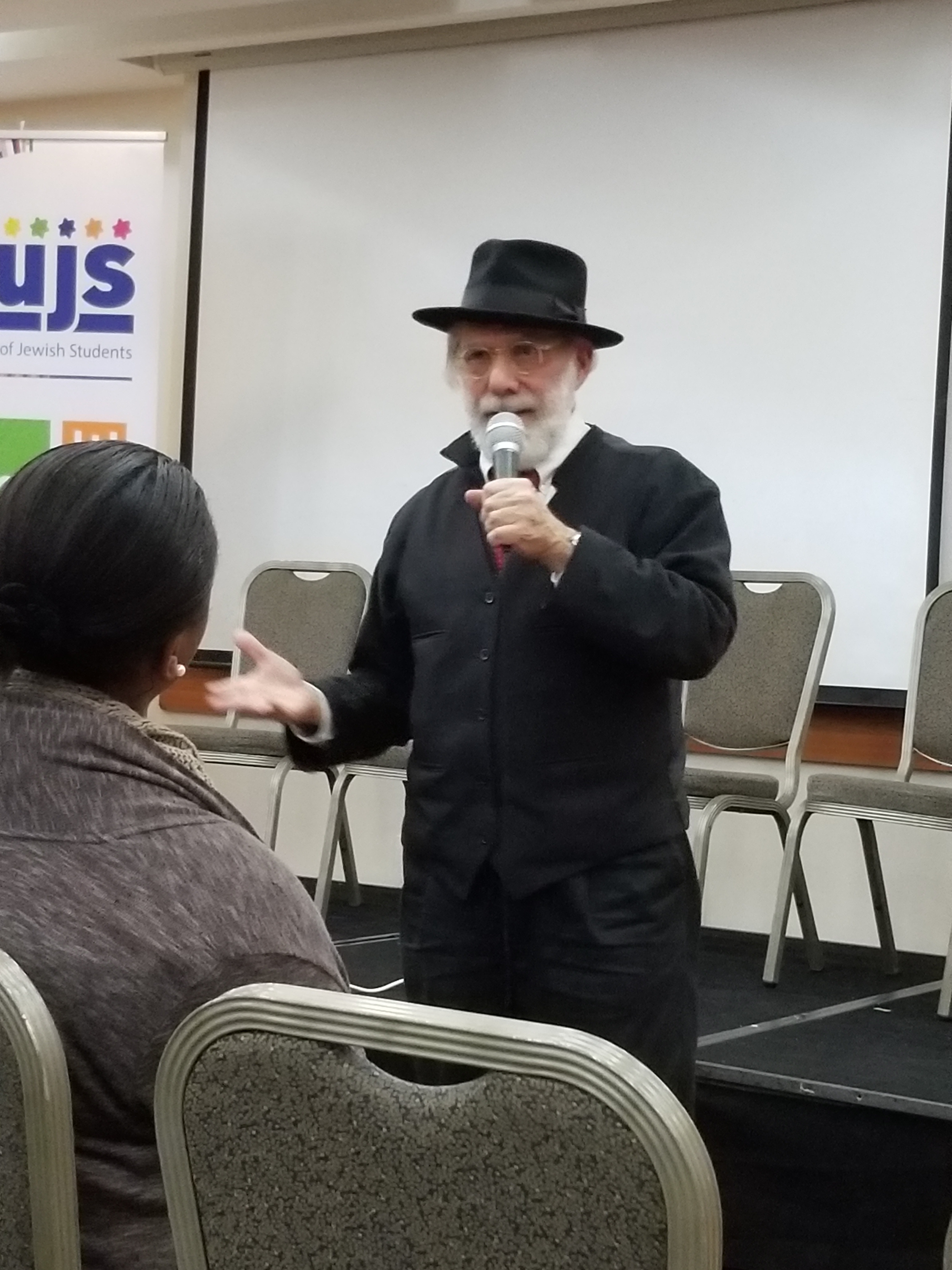 הרב בנג'י לוין